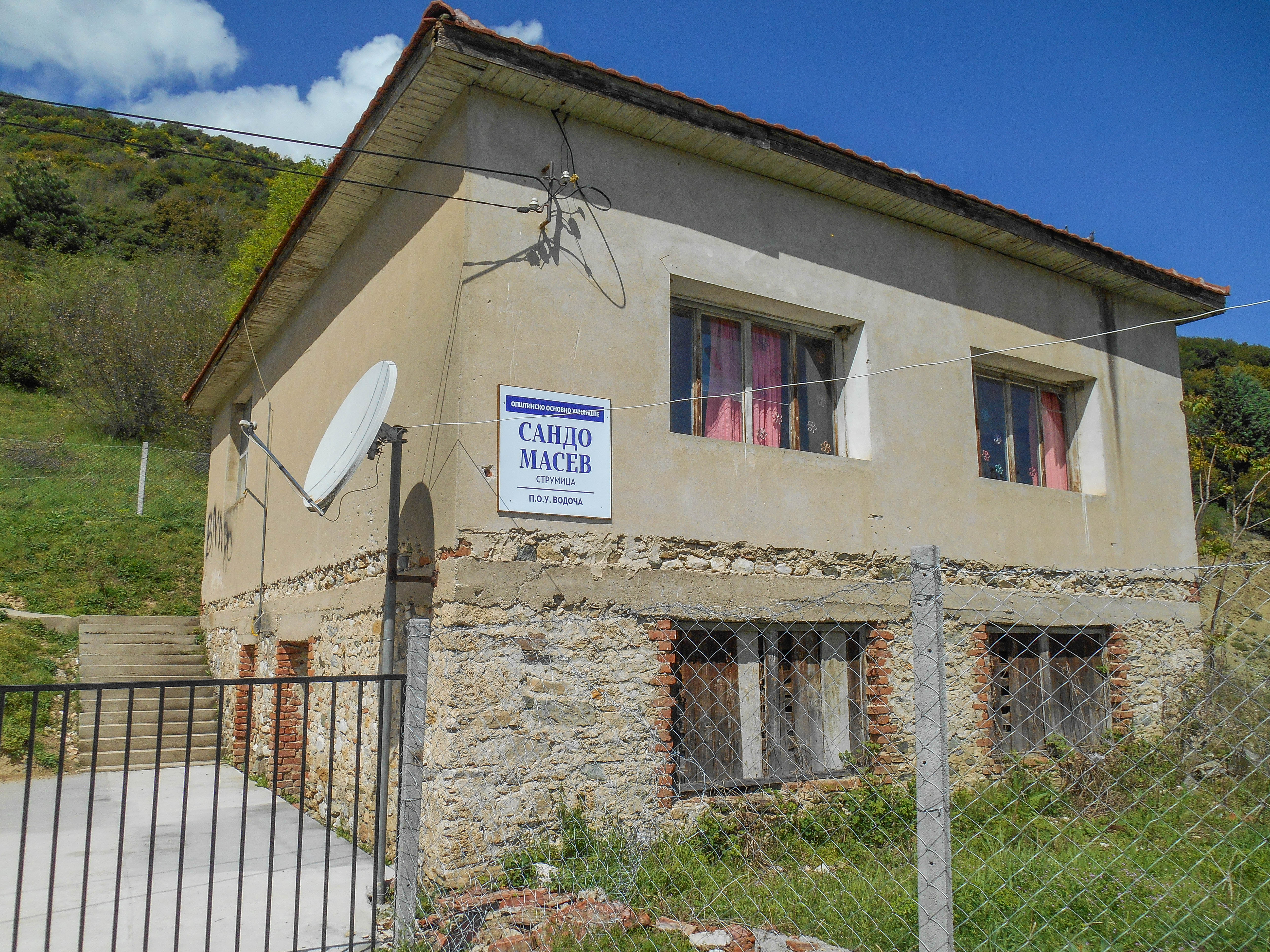 Училиште Сандо Масев